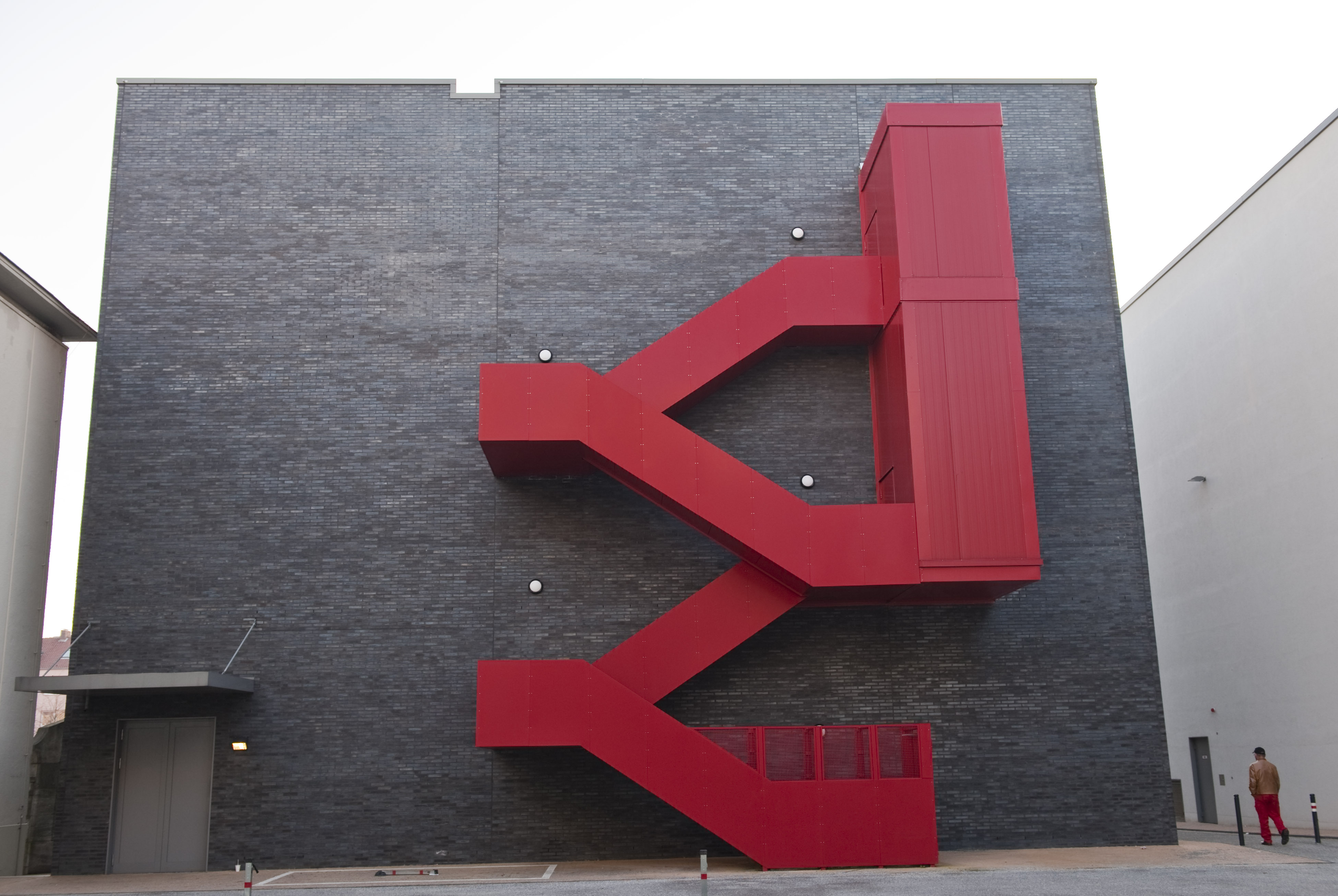 Kunstmuseum Bremerhaven, back